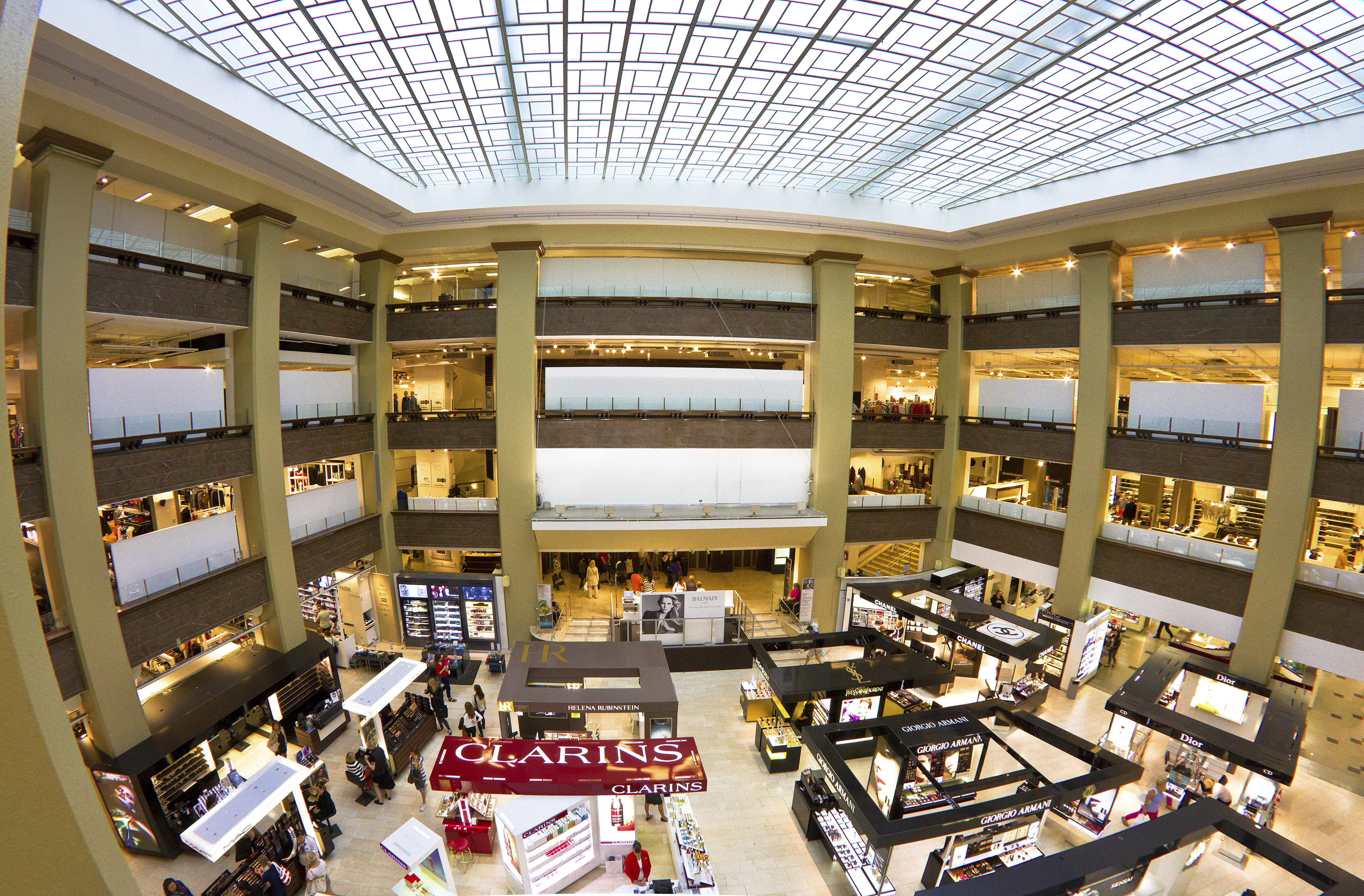 Stockmann Helsingin valopiha.